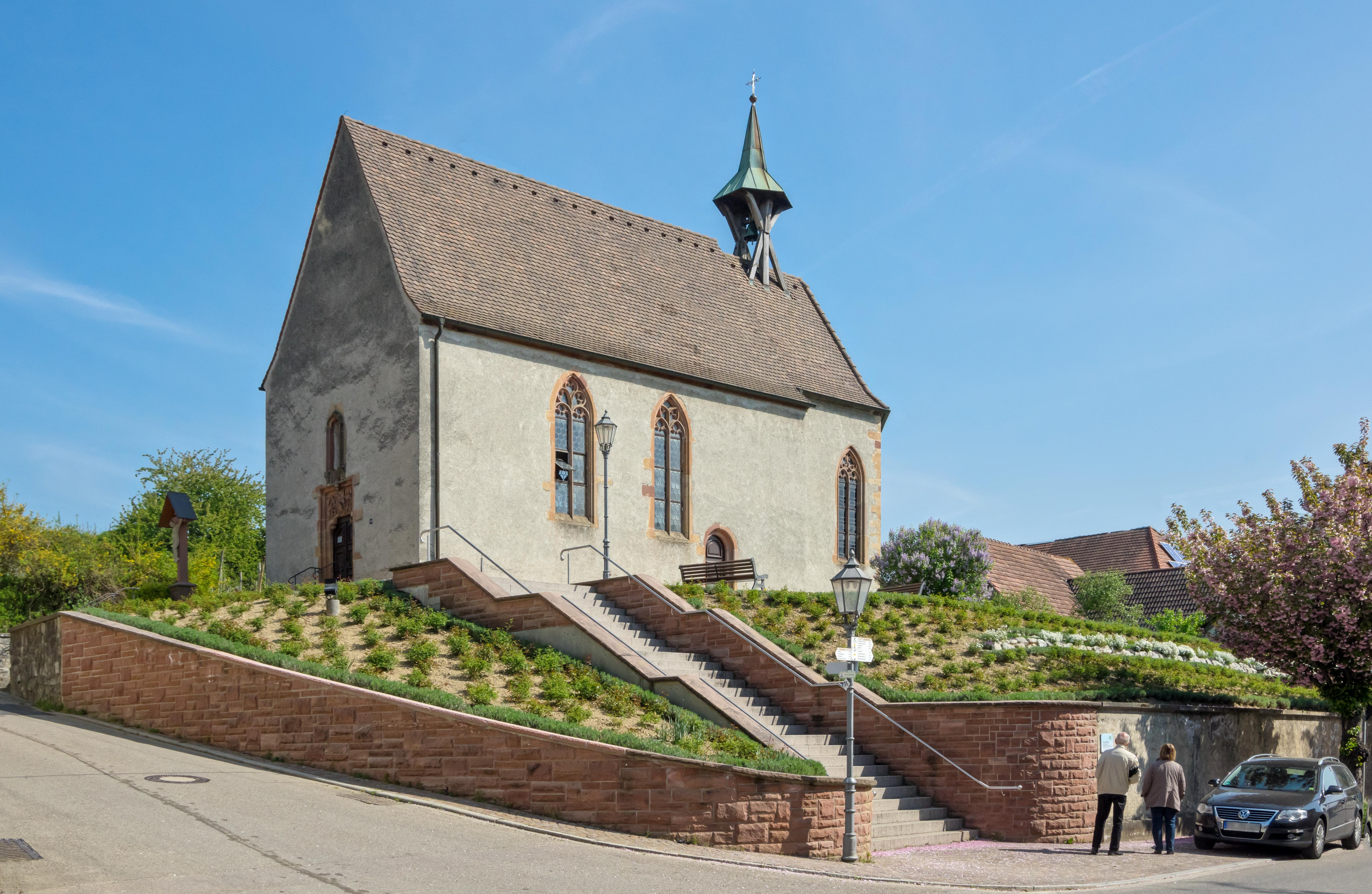 St. Alban in Bötzingen. Sie wurde erbaut um 1480 und war eine ehemalige Kirche des Deutsch-Ordens. Im Volksmund wird sie Peschdkirche genannt. Im Innern sind einige kunstgeschichtliche Kleinode Die katholische Kirche St. Alban in Bötzingen Oberschaffhausen